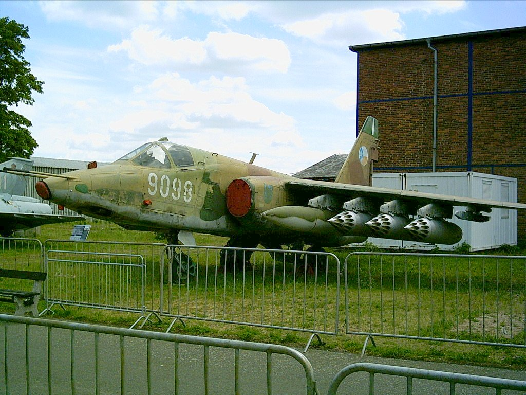 Sukhoi Su-25K, Kbely museum, Prague